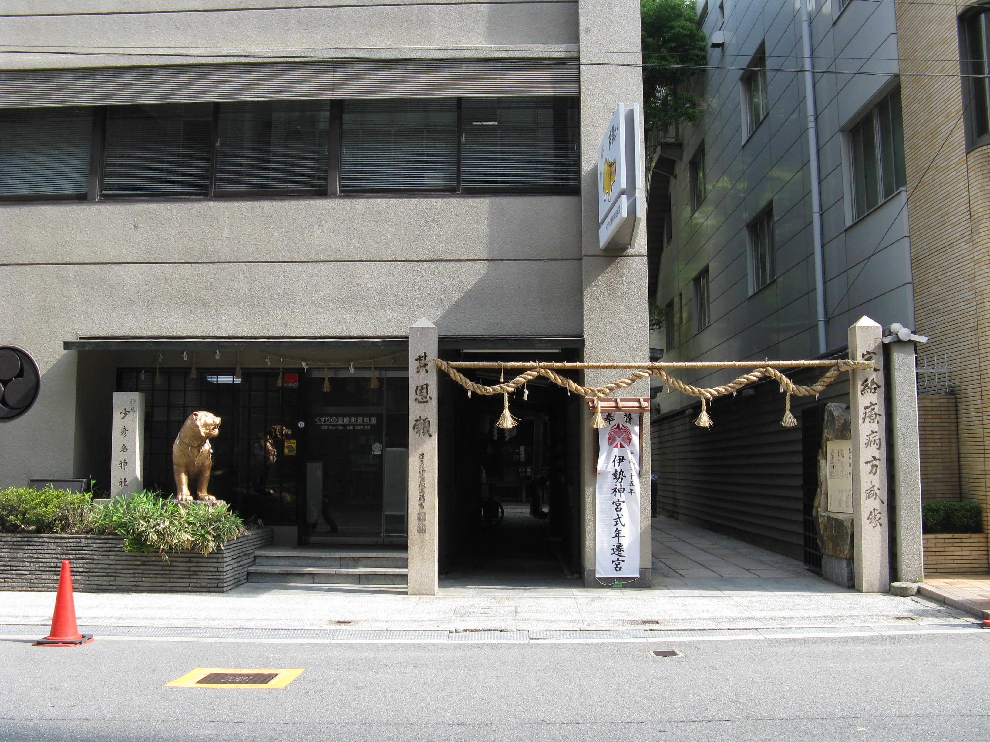 くすりの道修町資料館（左）と少彦名神社（右）